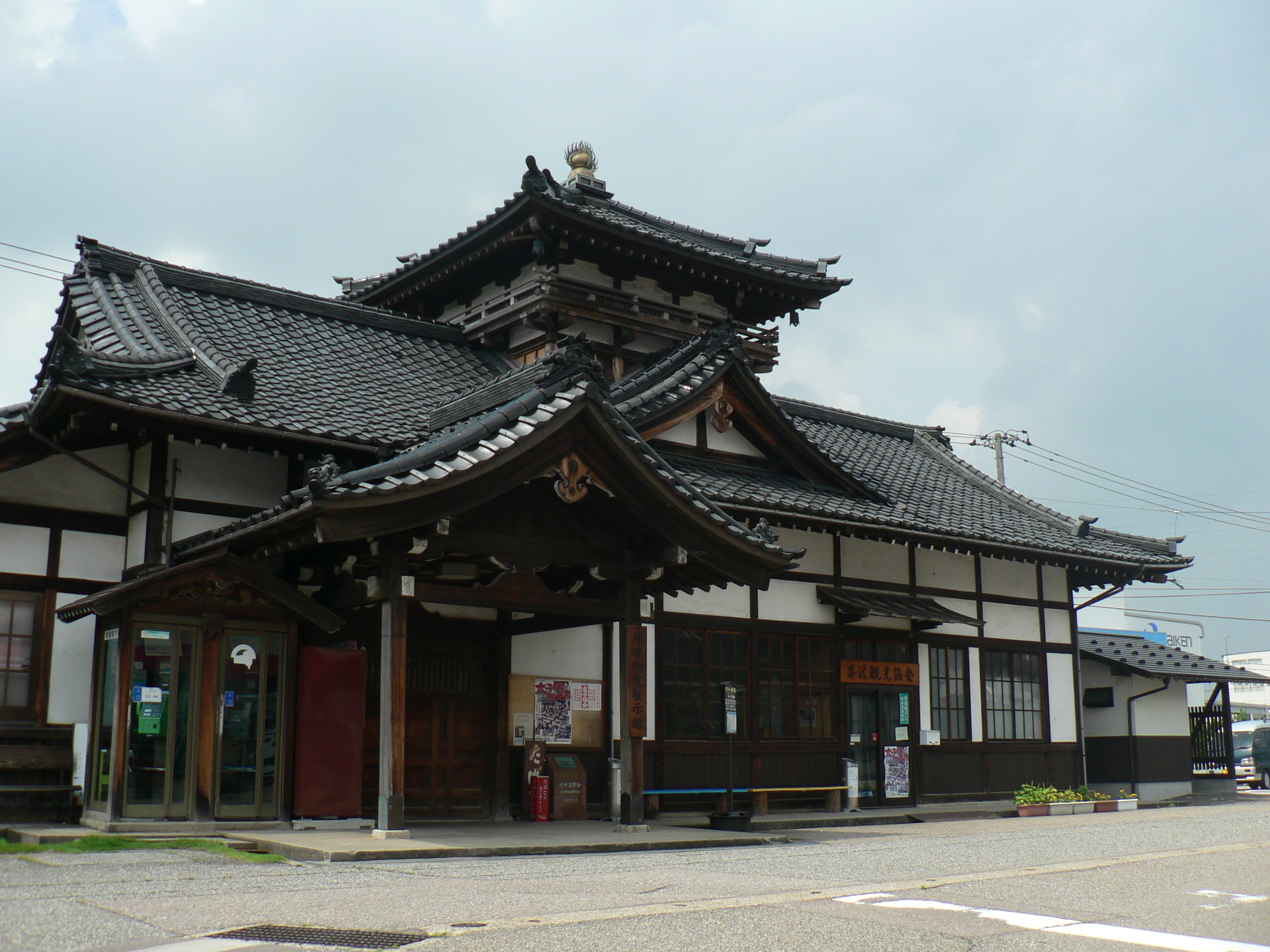 加越能鉄道加越線（廃線）の旧井波駅、駅舎。 登録有形文化財 2013年7月撮影。